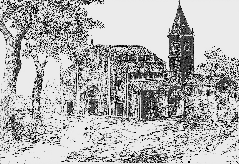 Il complesso della basilica dei Santi Gervasio e Protasio in una stampa precedente al XVI secolo, Rapallo, Liguria, Italia